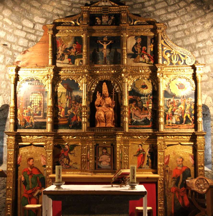 Retaule renaixentista de l'església de Sant Pere a Vilanova d'Éssera (la Franja-Osca)